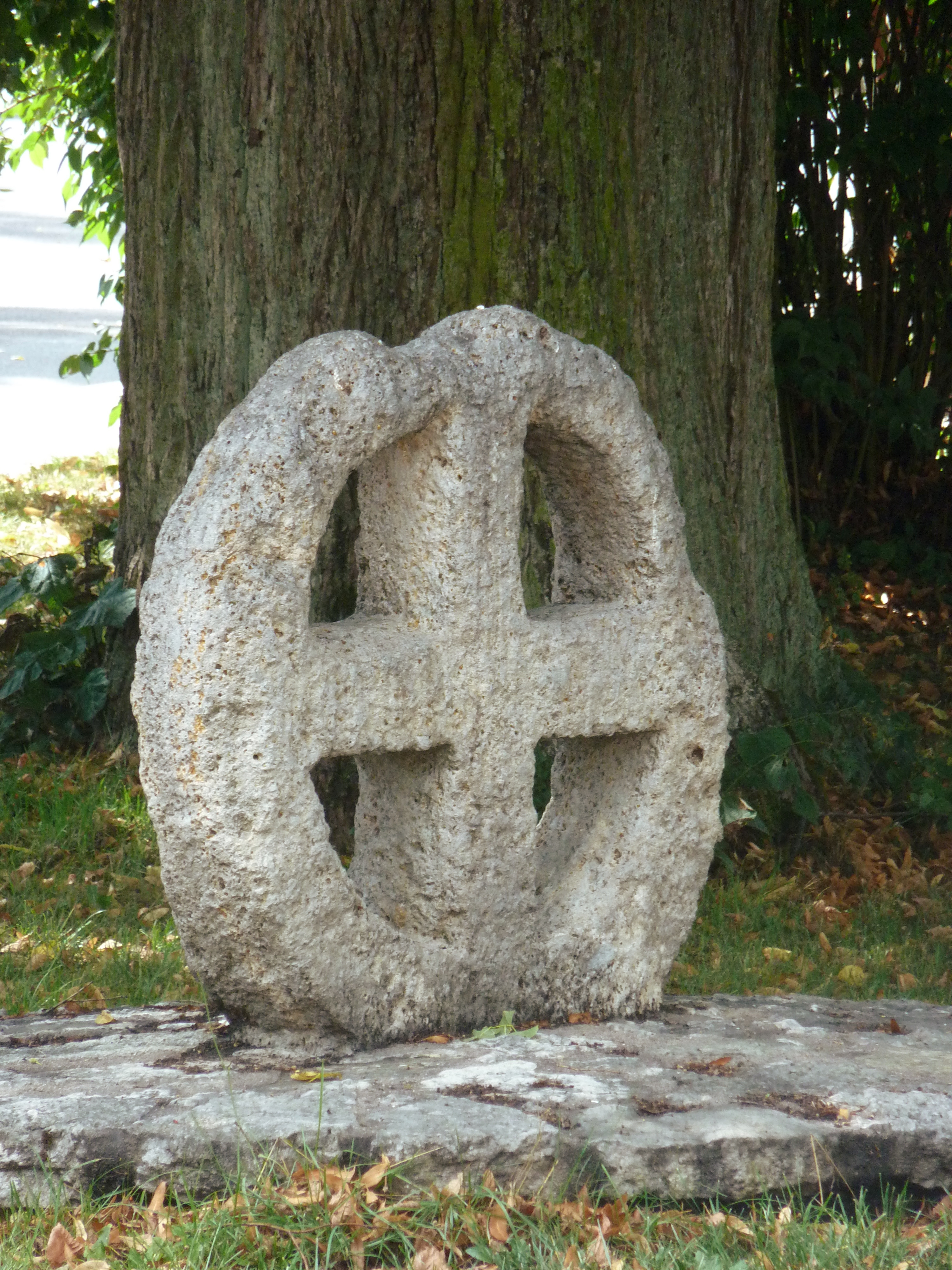 Steinernes Radkreuz am Ortseingang von Varmissen, Stadt Dransfeld, Südniedersachsen, Deutschland. Dieses Steinkreuz wurde in das Wappen von Varmissen aufgenommen